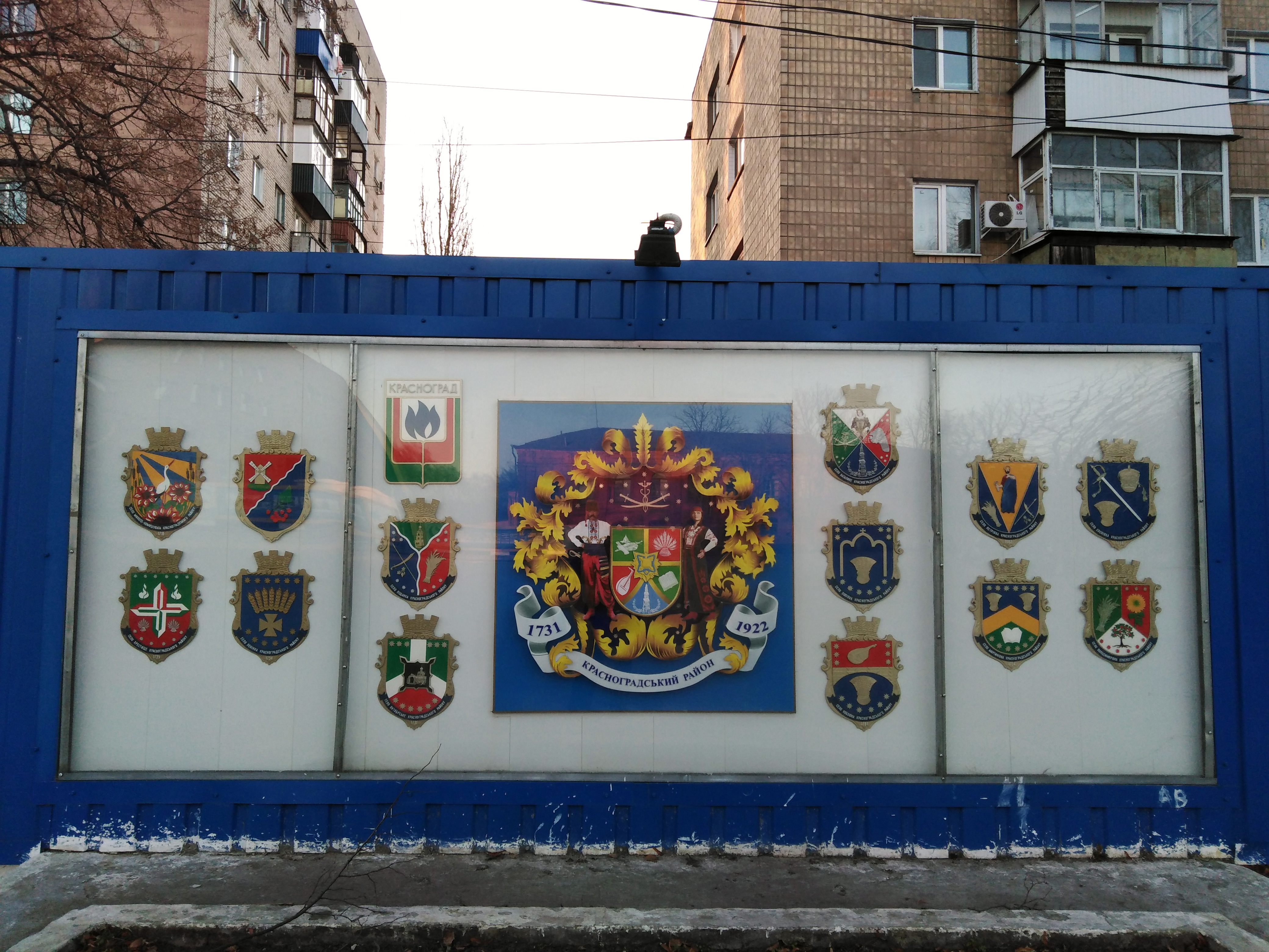 Україна, Харківська область, Красноградський район. Герби населенних пунктів району на майдані біля райвиконкому.